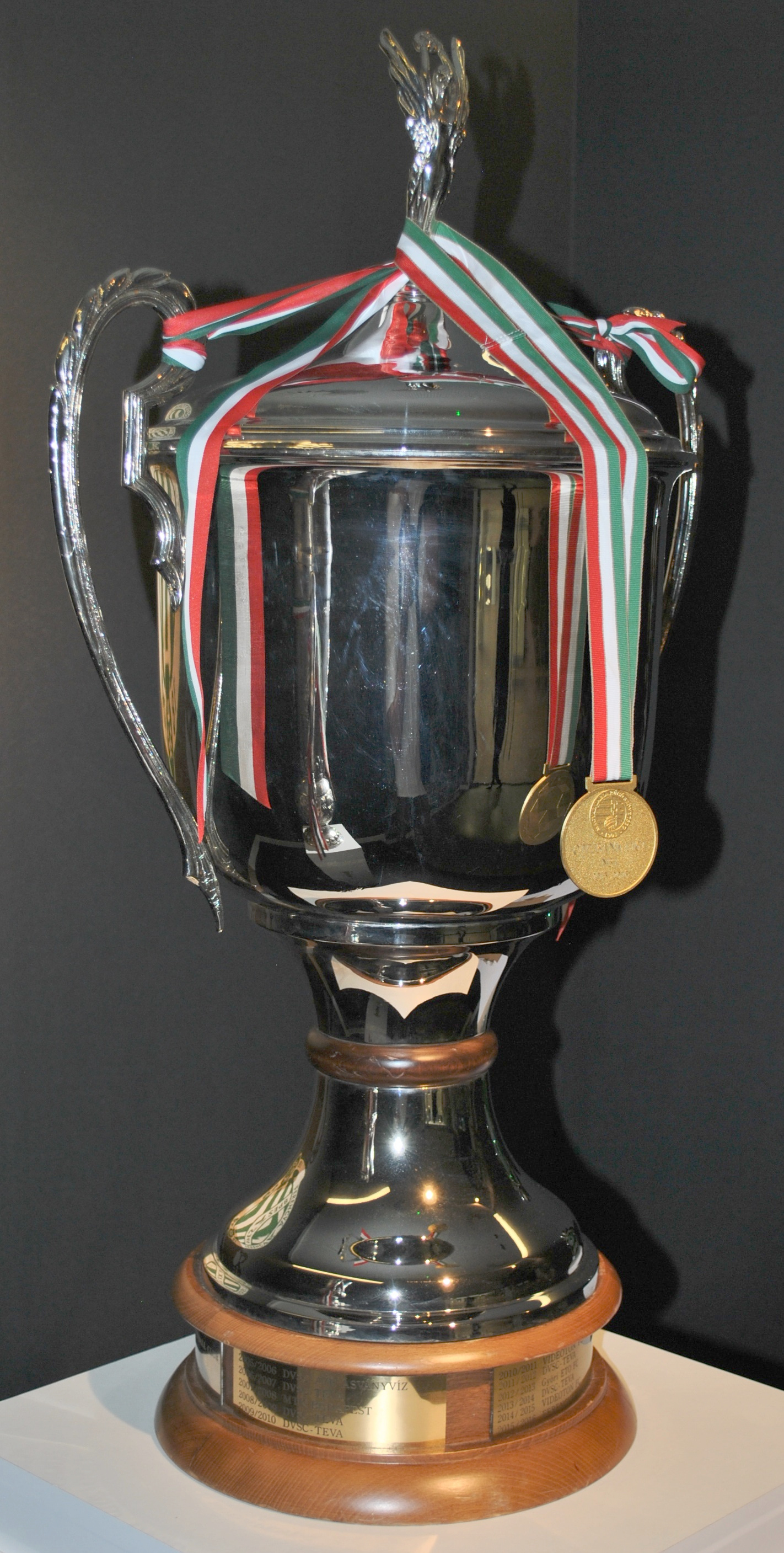 NB1 bajnoki serleg